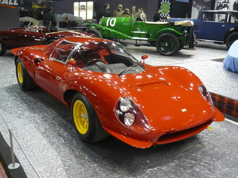 Retromobile 2012